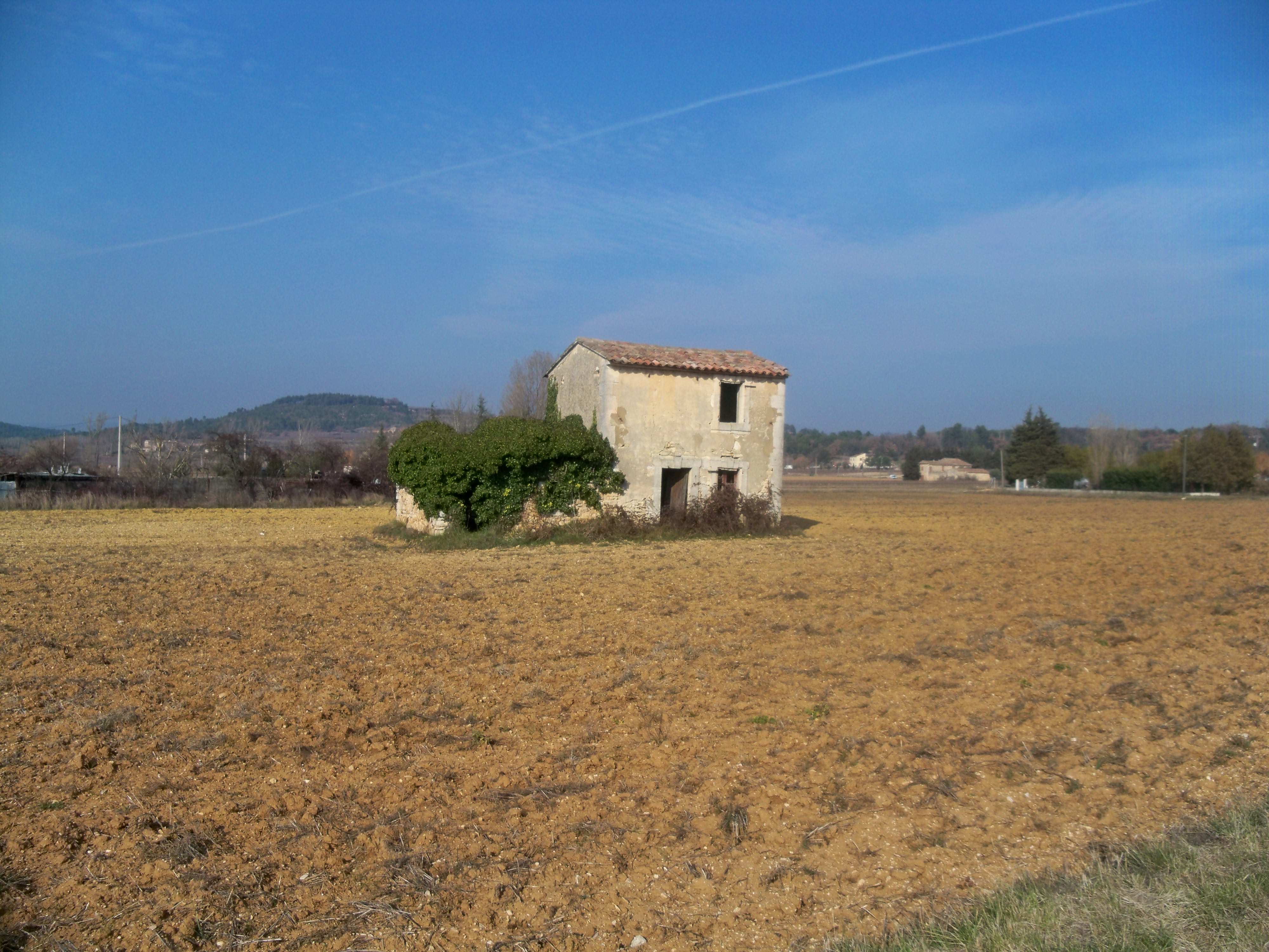 Cabanon à Bonnieux (Vaucluse, France).